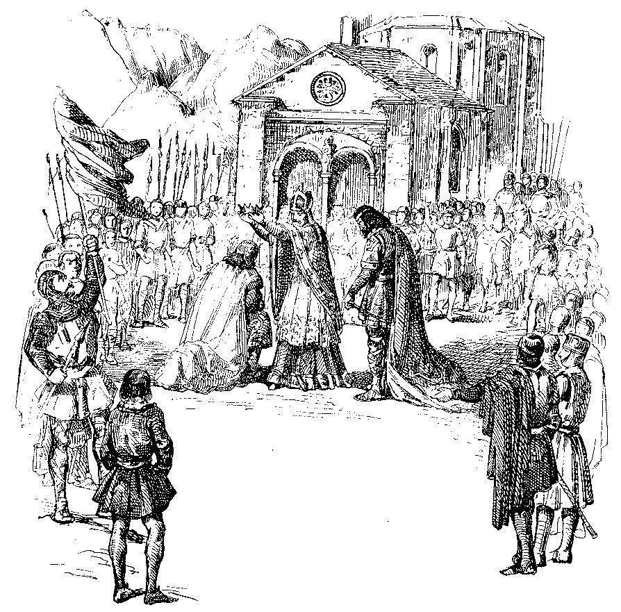 Roxín Roxal (esquerda) é coroado como rei de Galiza por Diego Páez (centro) trala abdicación de seu pai García (dereita) en Rogin Rojal, ó El paje de los cabellos de oro: Historia caballeresca del siglo XI de Benito Vicetto.